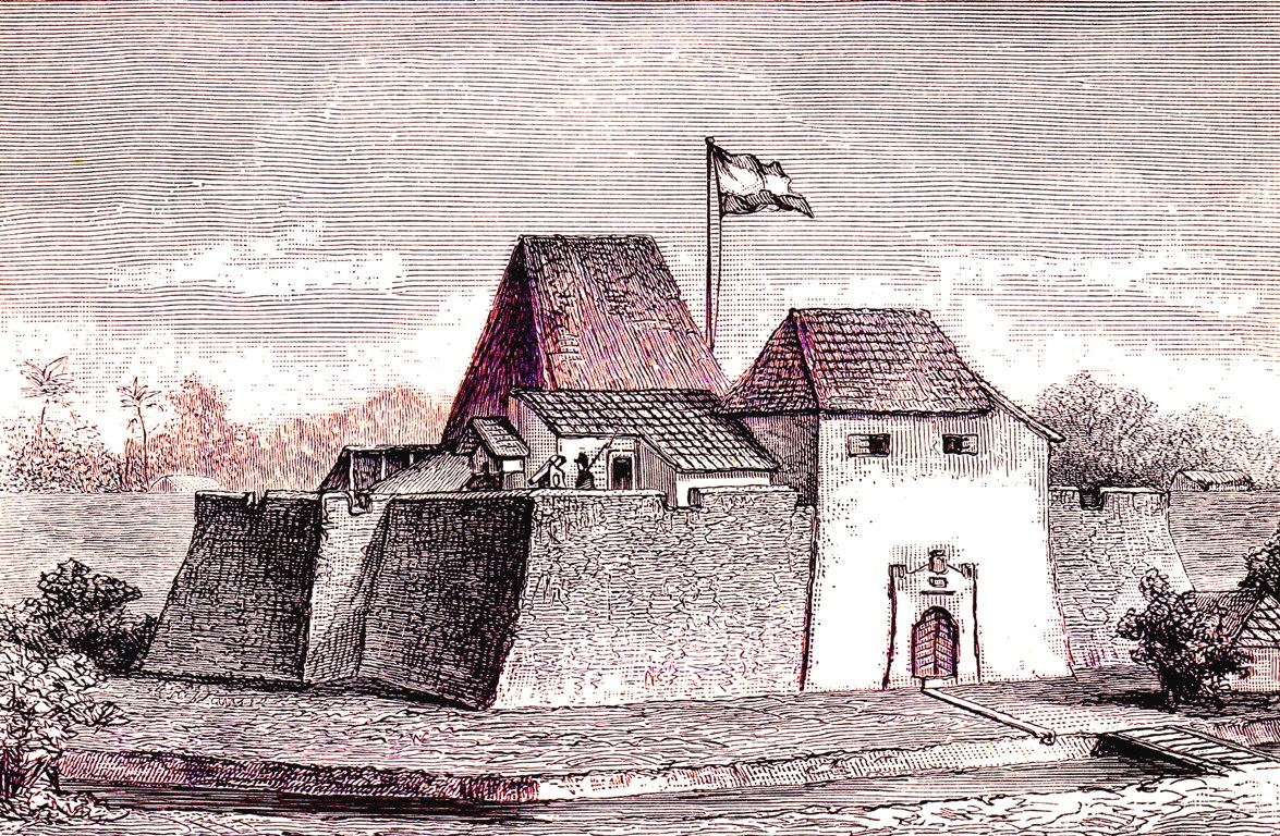 Fort Oldebarneveld te Batjan op de Molukken